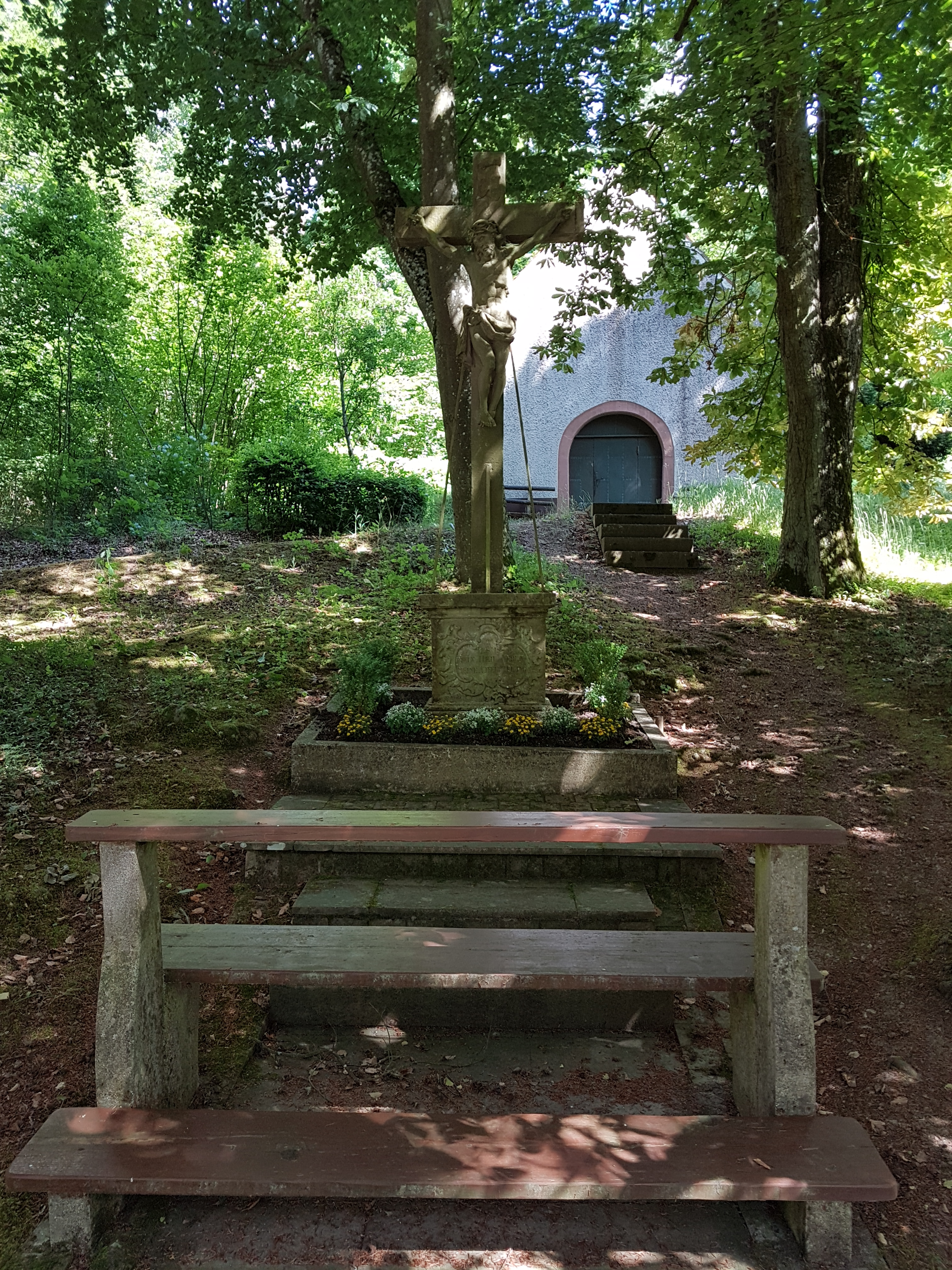 Kreuzweg zur Dittwarer Kreuzkapelle am Kreuzhölzle Bilder hochkant